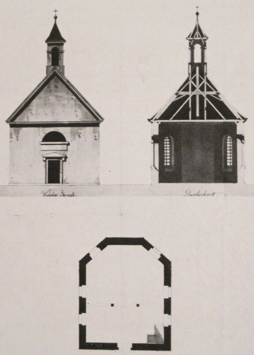 Reformierte Kirche in Mannheim-Friedrichsfeld